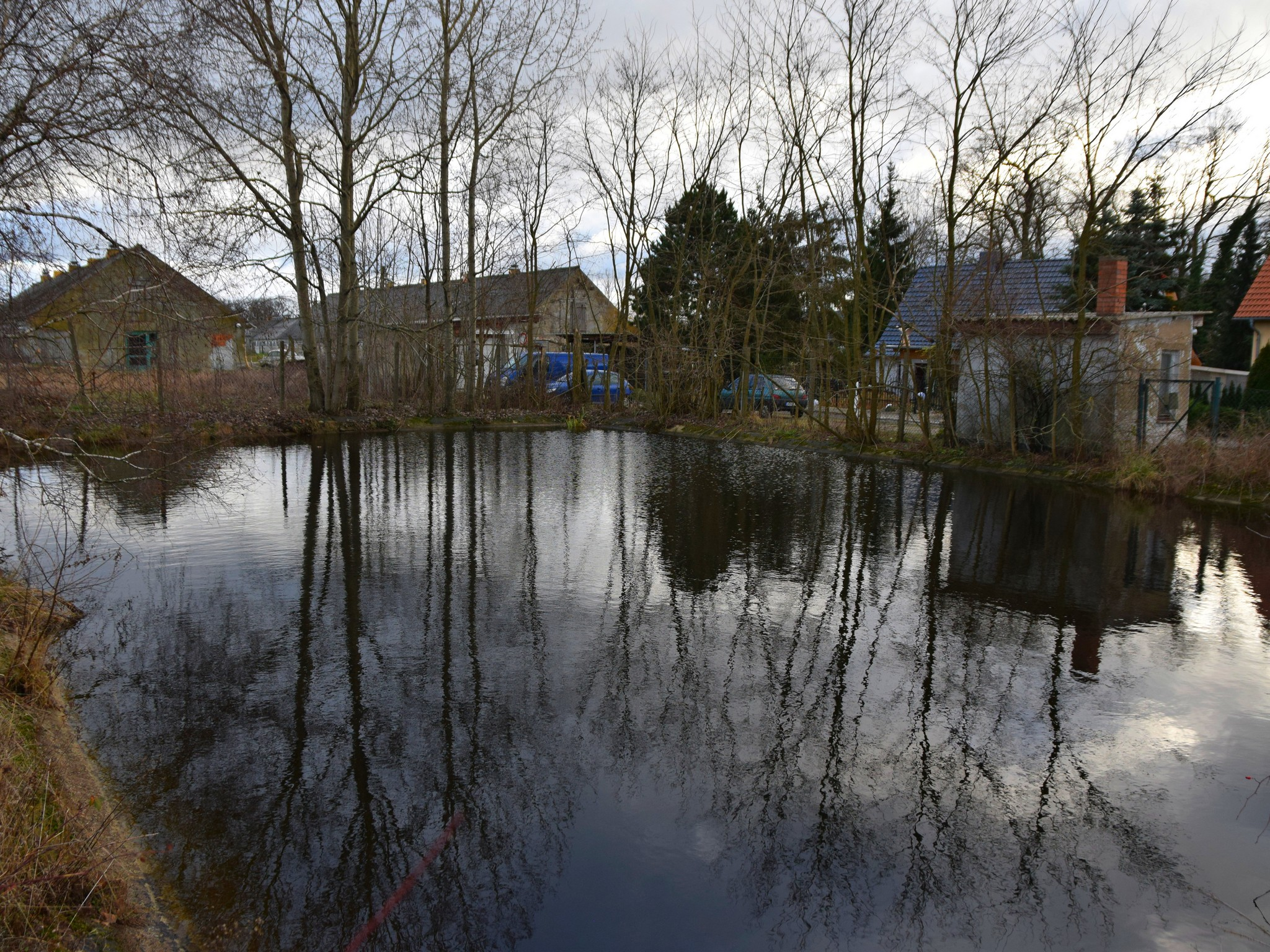 Teich an der Neuen Straße in Frankfurt (Oder)-Lichtenberg